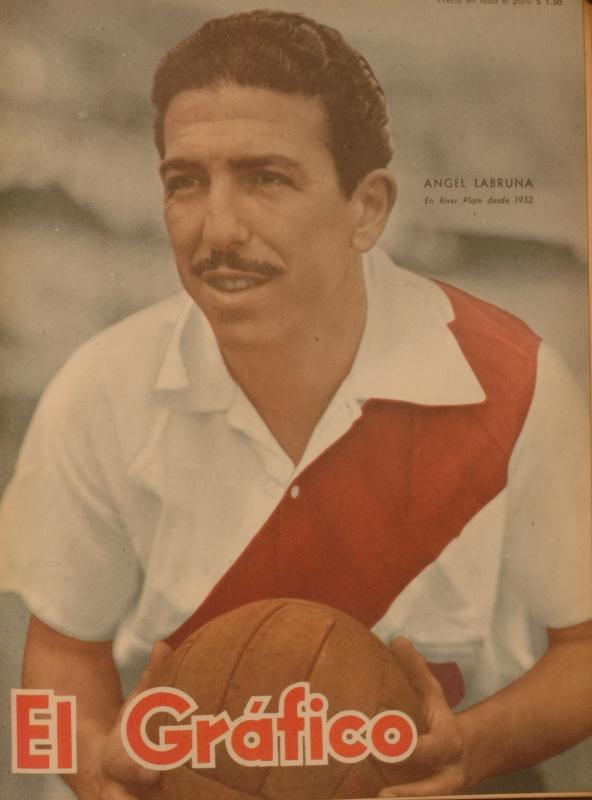 Ángel Labruna posando para la Revista El Gráfico